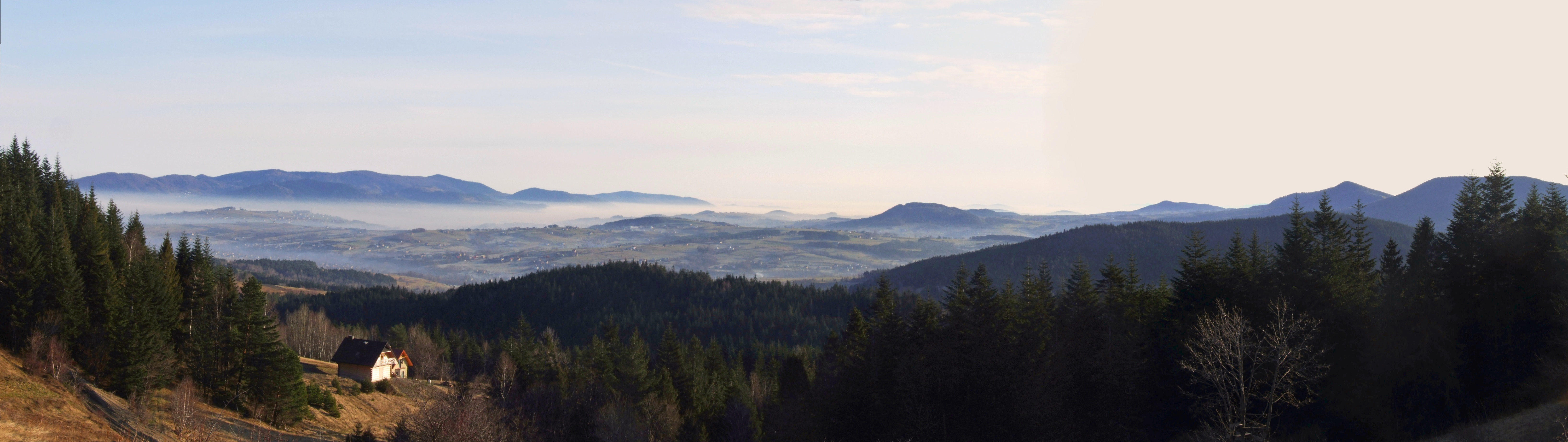 Widok z Chyszówek na Słopnice i Beskid Wyspowy. Powyżej mgieł zalegających w dolinach Pasmo Łososińskie